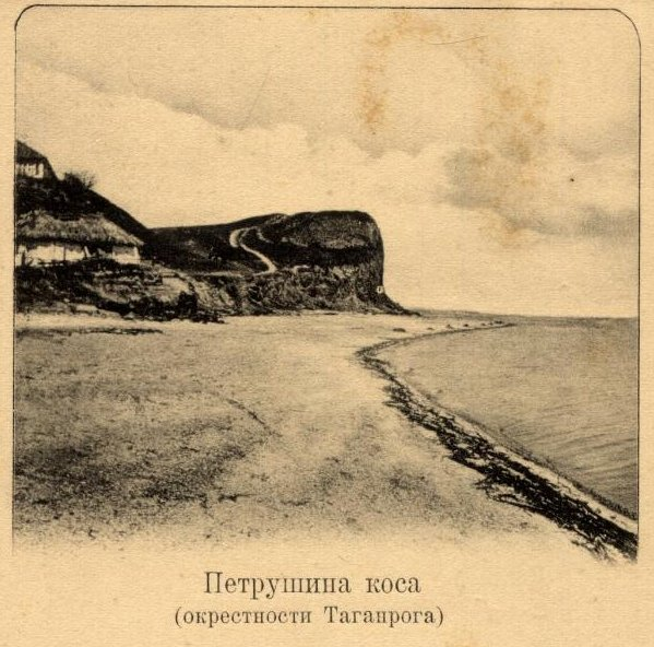 Открытка с видом на Петрушину косу